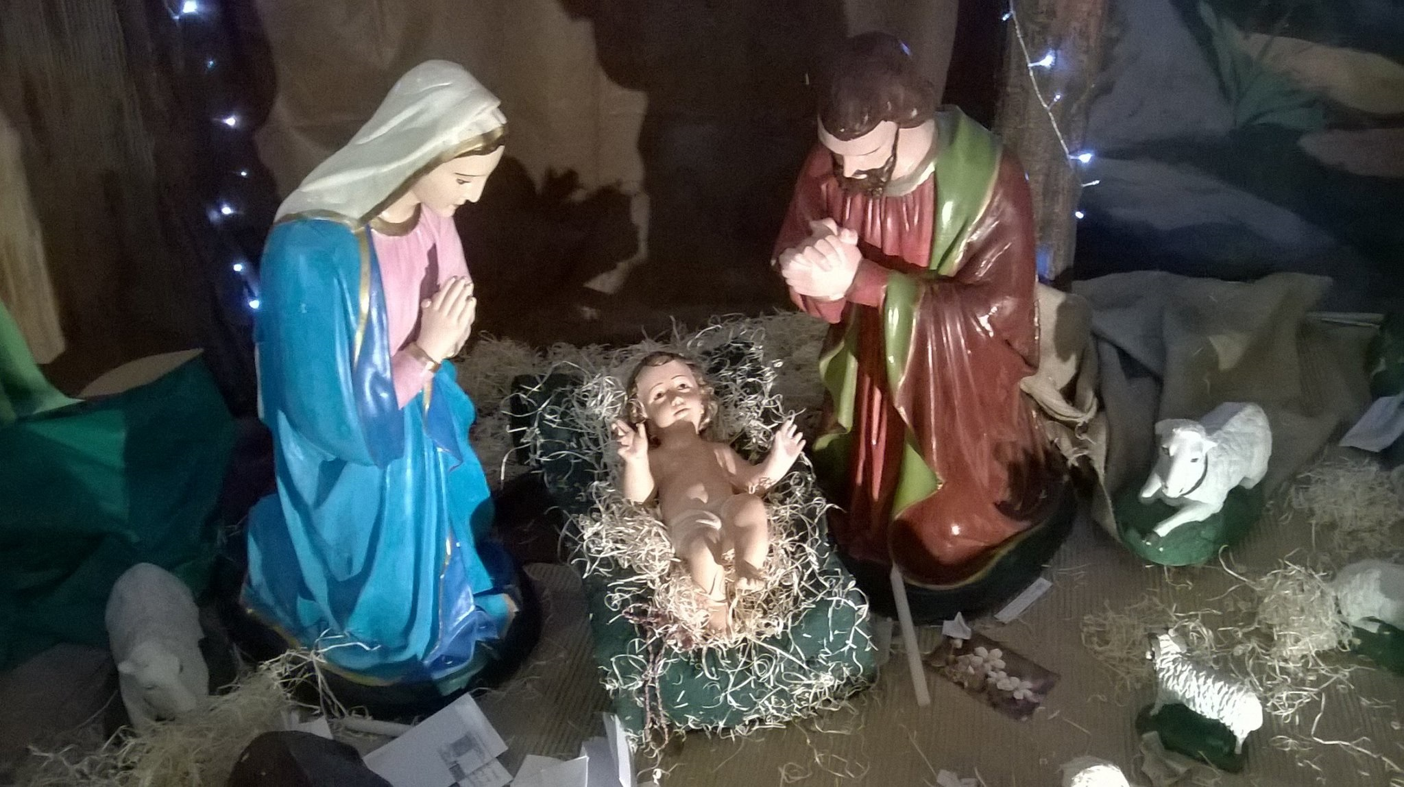 Natividad de Jesús. Santuario Nuestra Señora de Lourdes.